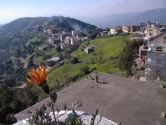 VILLAGE TAHANOUTS : Tahanouts ou Tahanut est un beau village faisant partie des principales localités de la commune d'Ait-Aissa-Mimoun. Perché sur la montagne d'"Ighil N'Ath-Aissa-Y'moun" à 801 mètre d'altitude, à 15 Km du chef lieu de Wilaya Tizi-Ouzou. Aussi par sa géostratégie, a joué un très grand rôle pendant la guerre de libération, qu'il a payé lourdement en perdant beaucoup de ses fils. L'étymologie du nom Thahanouts, qui vient du mot communément du local ou de la bâtisse de la boutique du forgeron ou maréchal ferrant (Aheddadh) qui d'après les ancêtres, faisait partie des premiers villageois installés sur les lieux, (Pour proposer ses services aux agriculteurs des villages avoisinants) d'ailleurs un quartier composant le village a gardé le nom "El-Harra-Iheddadhen.